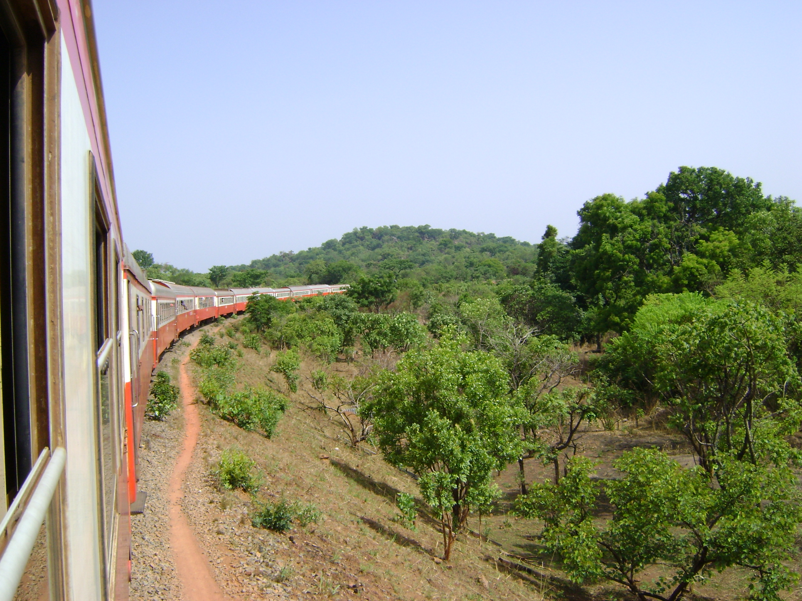 Interlingua: Treno per Yaoundè da Ngaoundéré